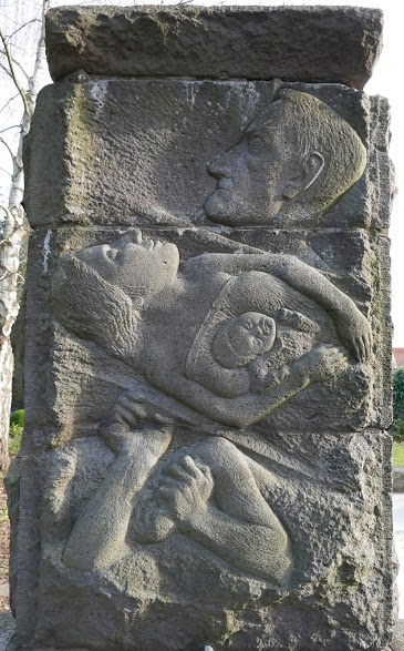 Goethebrunnen (Ilmenau): Das Löber-Relief